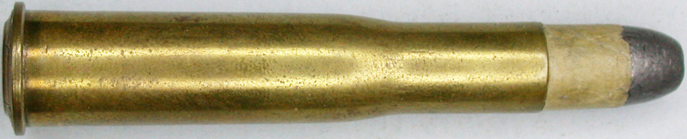 Naboj 9,5x60 R turški Mauser